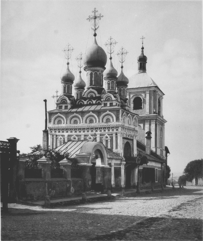 Храм Успения Пресвятой Богородицы в Гончарах (Москва)